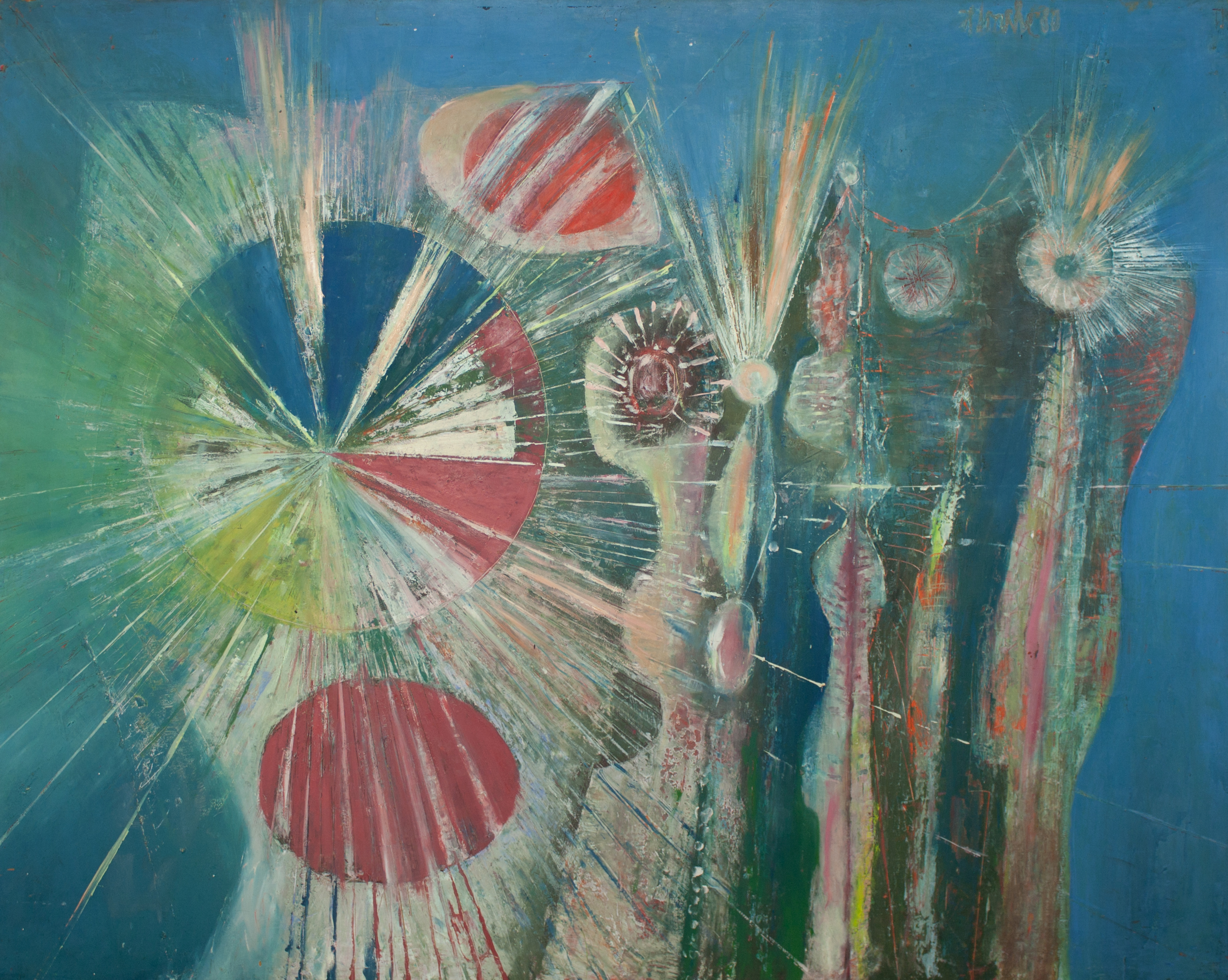 Gemälde von Heinz Drache 1980, Titel "Strahlendes"